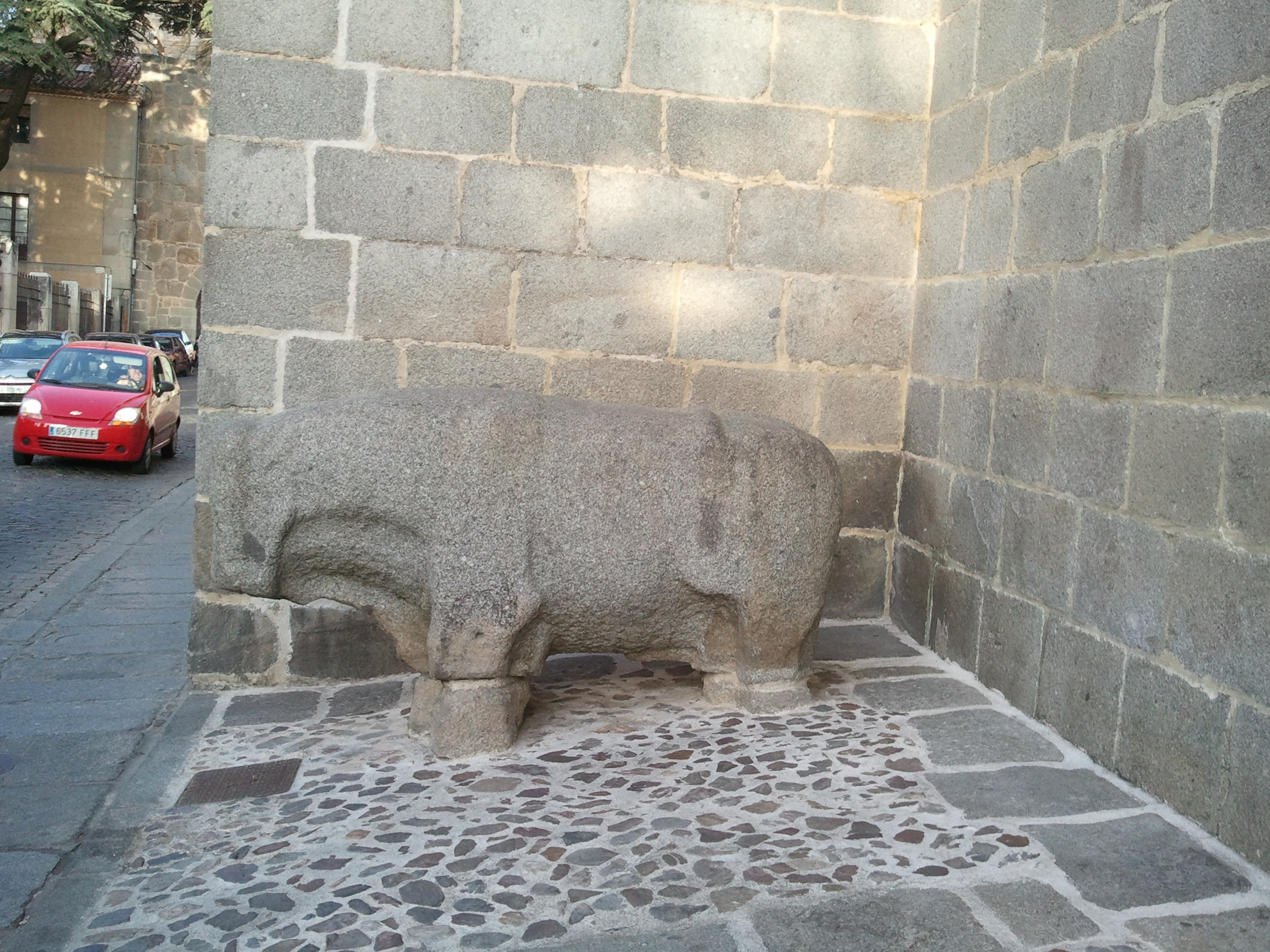 Verraco procedente de Muñogalindo, hoy frente al Palacio de los Verdugo, en Ávila.